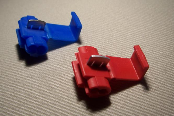 Kabelabzweiger für verschiedene Aderquerschnitte